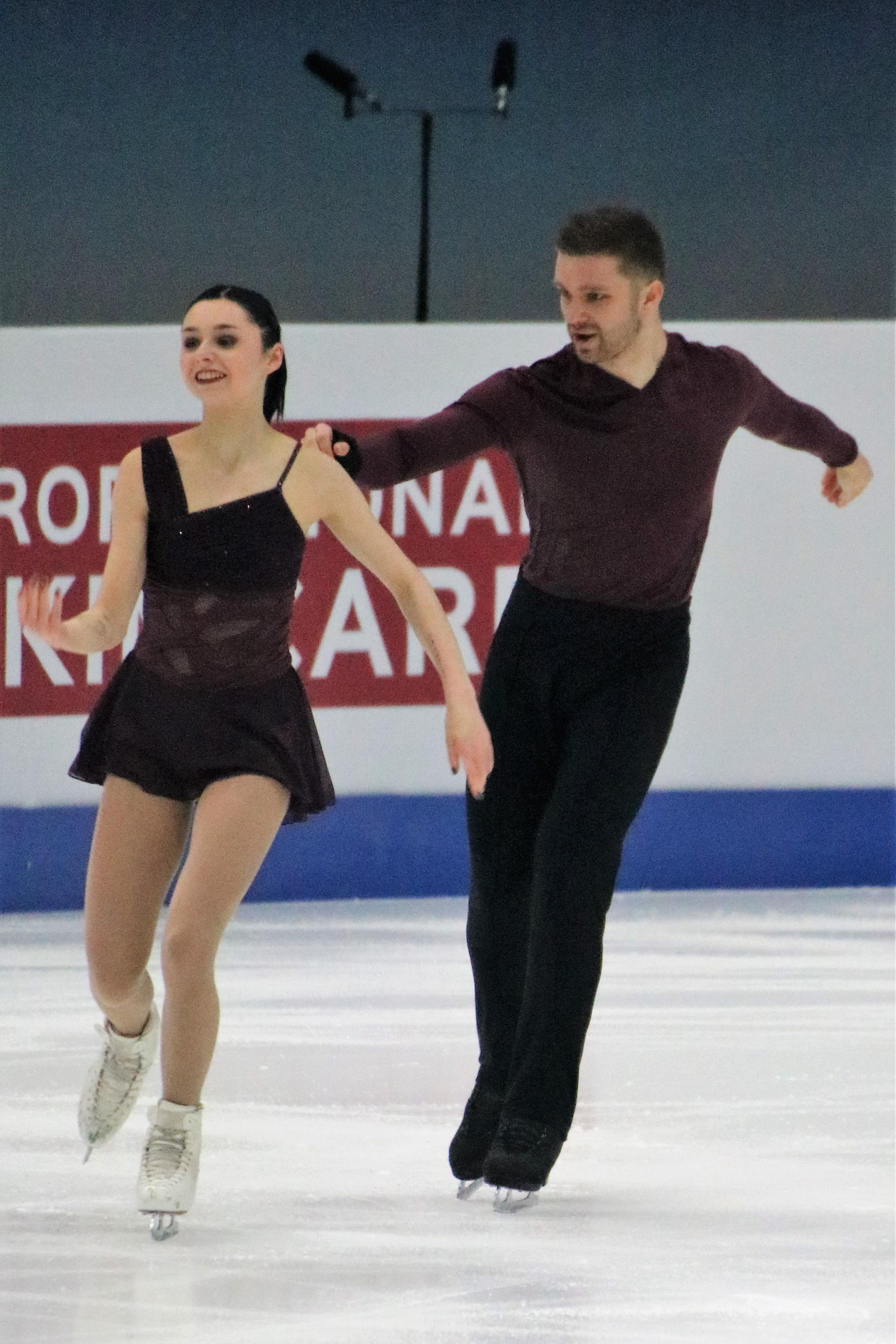 Клео Хамон и Денис Стрекалин (Франция) на чемпионате Европы по фигурному катанию 2020